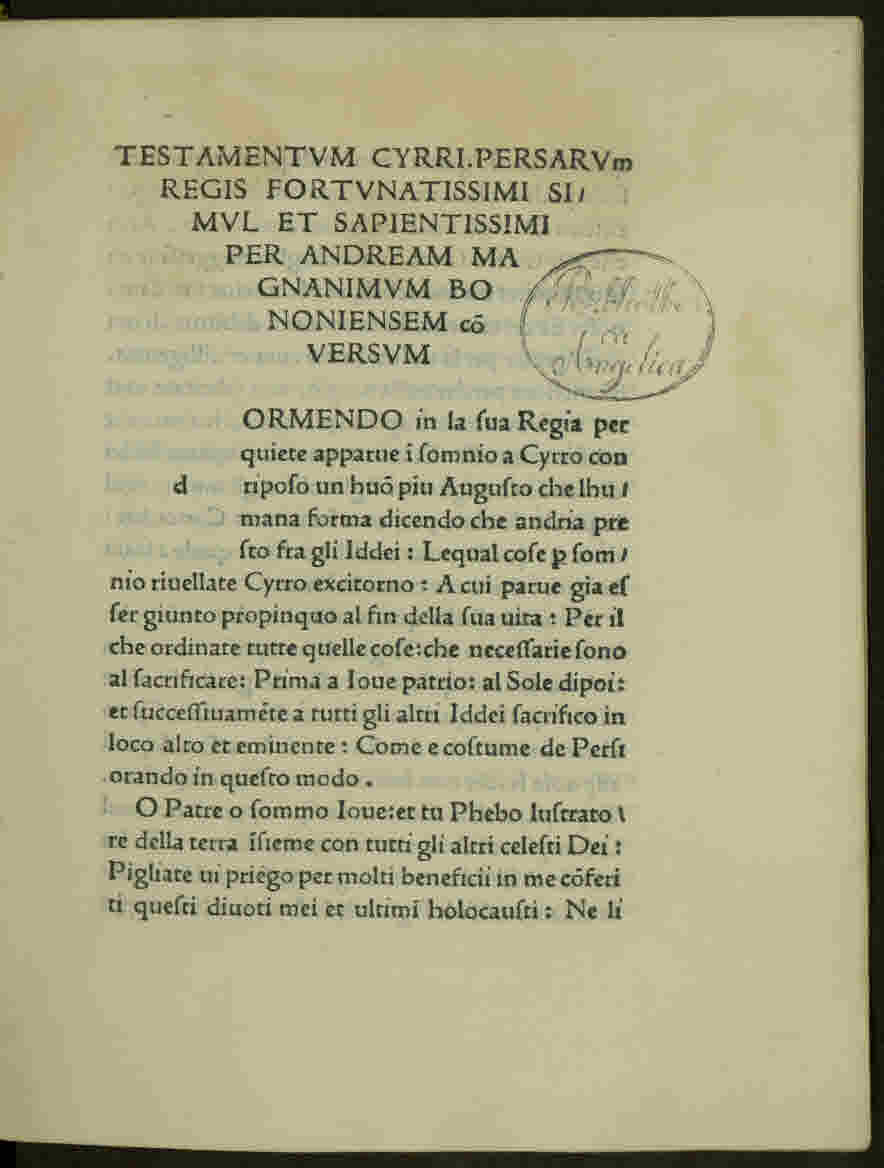 Cyri testamentum (italiano). - Impressum Bononie : per Platonem de Benedictis, Anno Domini MCCCCLXXXXIIII die vero II iulii. - 8 c. ; [*]⁸ ; 4°. - Estratto della Cyropaedia (VIII.7.2-28) .